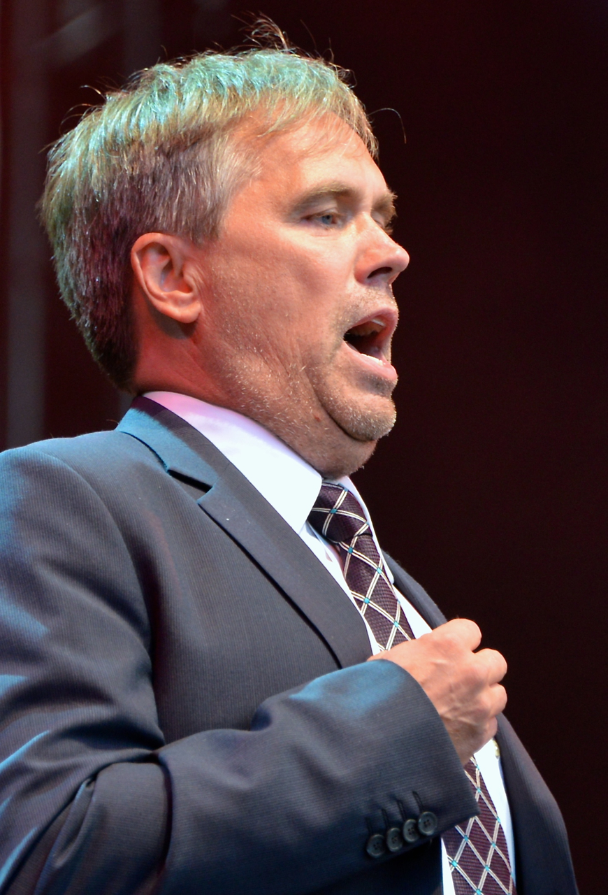 Klas Hedlund på en konsert på Gustav Adolfs torg under Stockholms Kulturfestival den 17 augusti 2013.